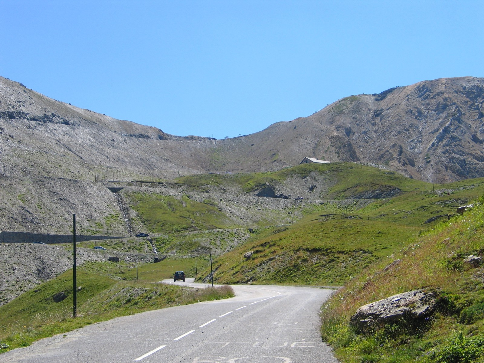 Col du Galibier – Die letzten 2 Kilometer der Galibierstraße von Norden, mit der Passhöhe. Der Tunnel befindet sich etwas links von dem Haus in der Bildmitte.